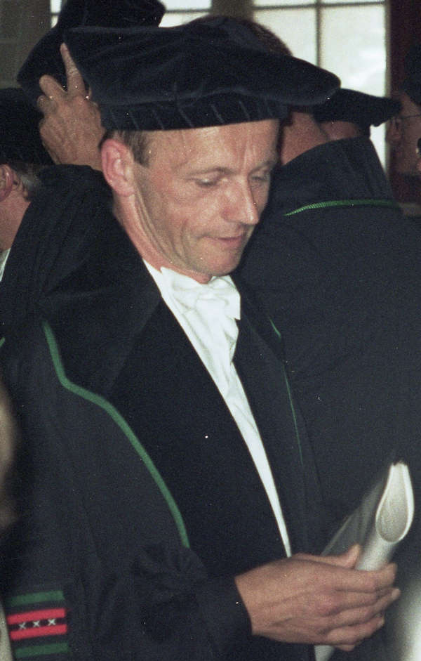 Prof. Dick Willems